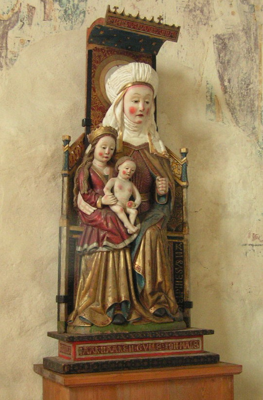 Sankta Anna med Maria och Kristusbarnet, skulptur i Enångers kyrka (The Virgin and Child with St. Anne) Träskulptur av furu i Enångers gamla kyrka. Signerad av Haaken Gulleson och daterad till 1520. Motivet "Anna själv tredje" är vanligt för den tiden. Texten vid foten: "IAAK HAAKEN GULLESON MALER MVCXX"